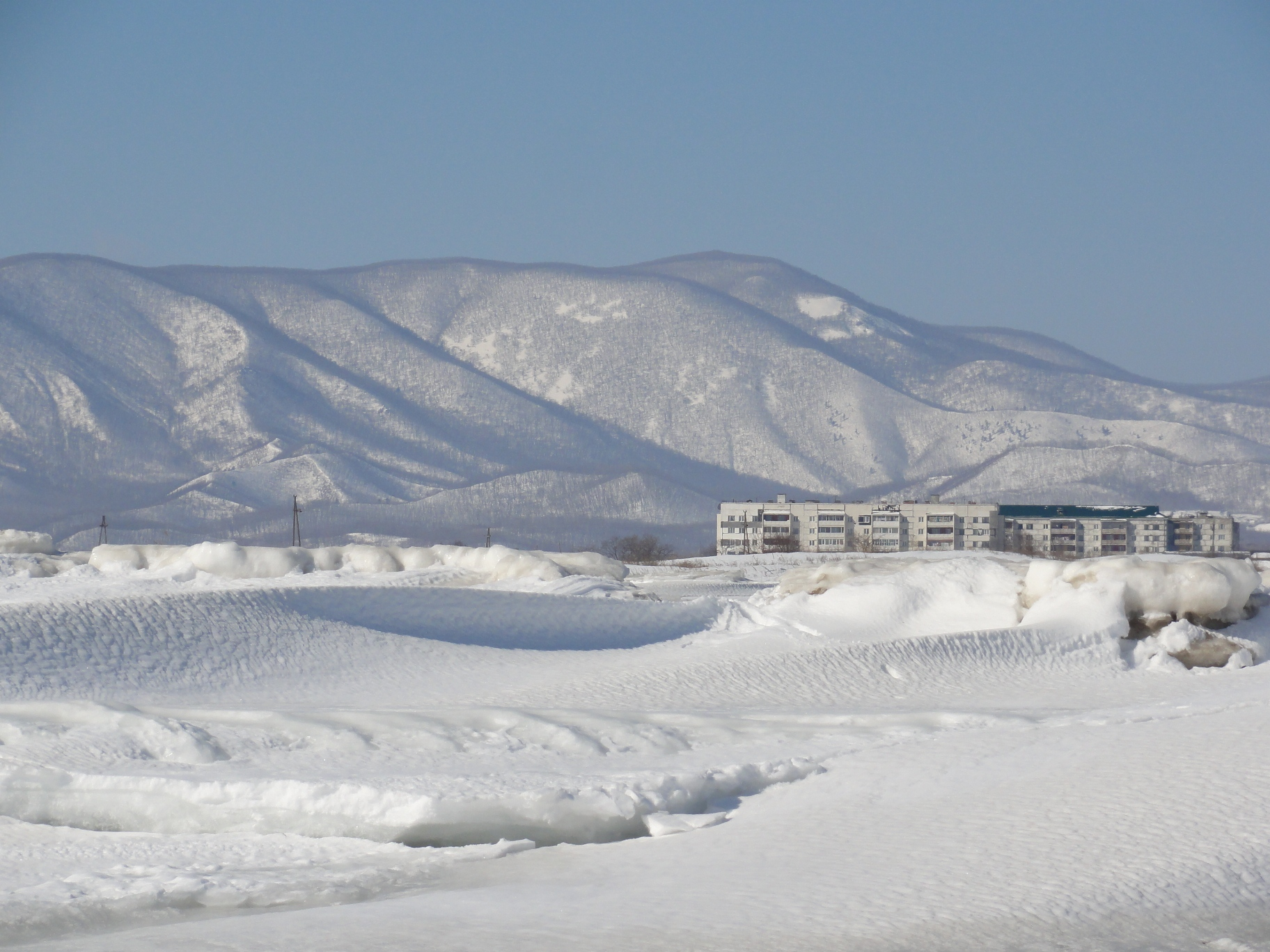 Rudnaja Pristaň, ulice Arseněva